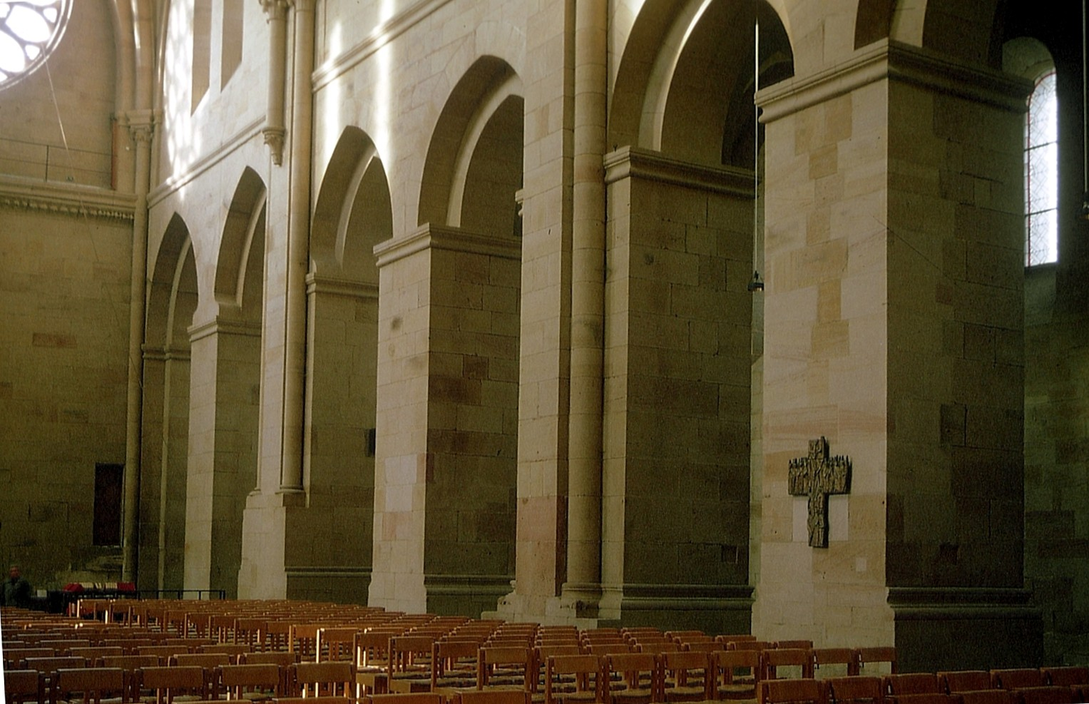 Abteikirche Otterberg